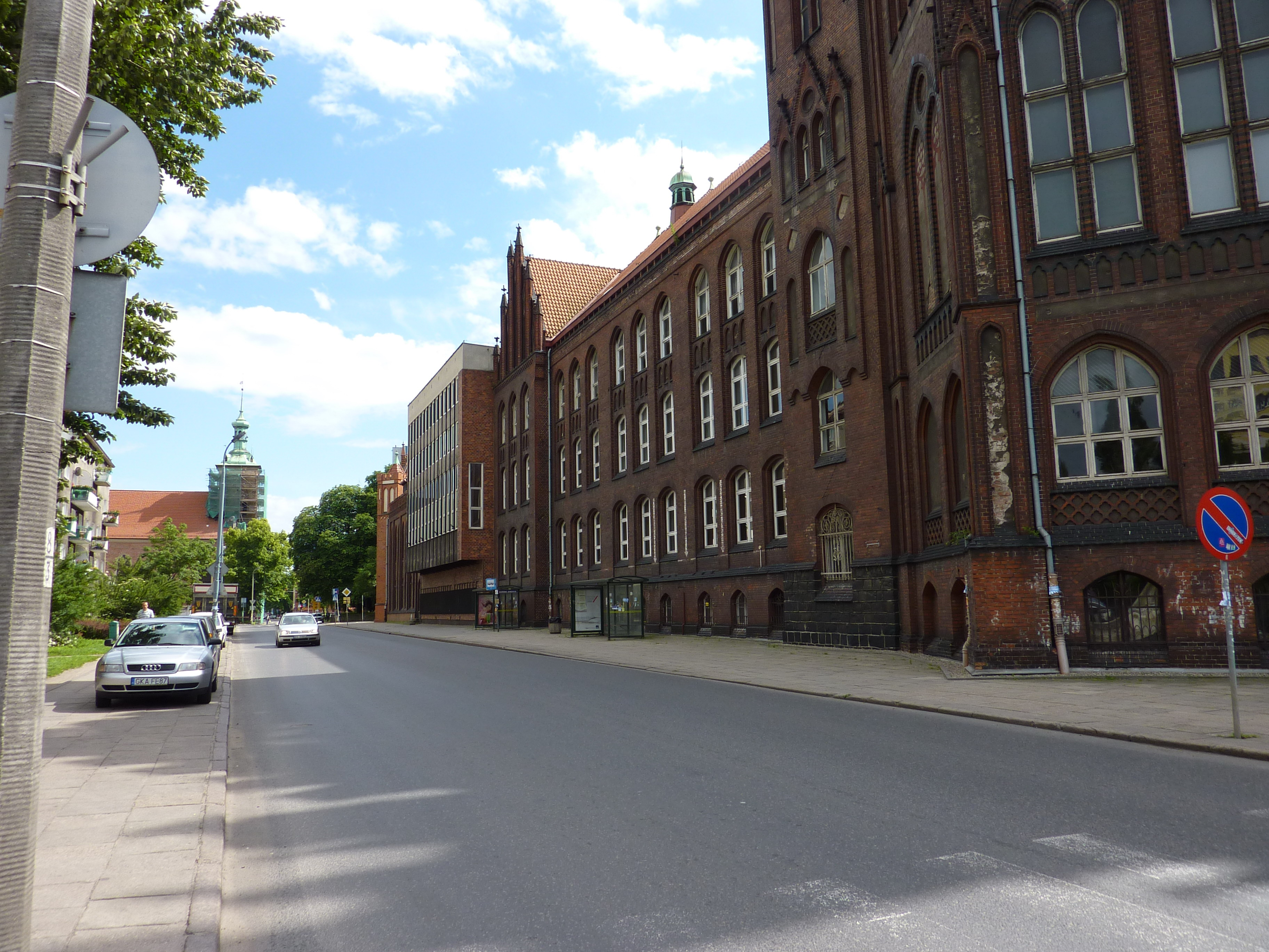 Gdańsk - pierwsze LO od strony ul. Łagiewniki, po sąsiedzku z gmachem Biblioteki Gdańskiej PAN. W oddali po lewej kościół św. Jakuba OO. Kapucynów.